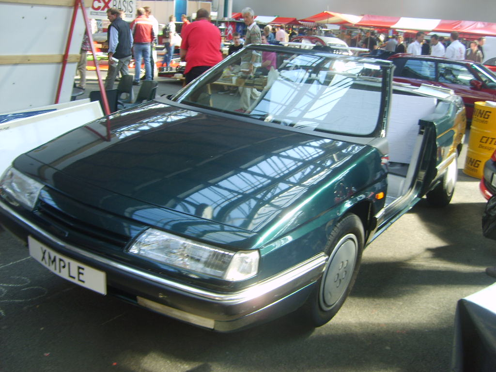 CitroMobile 2007